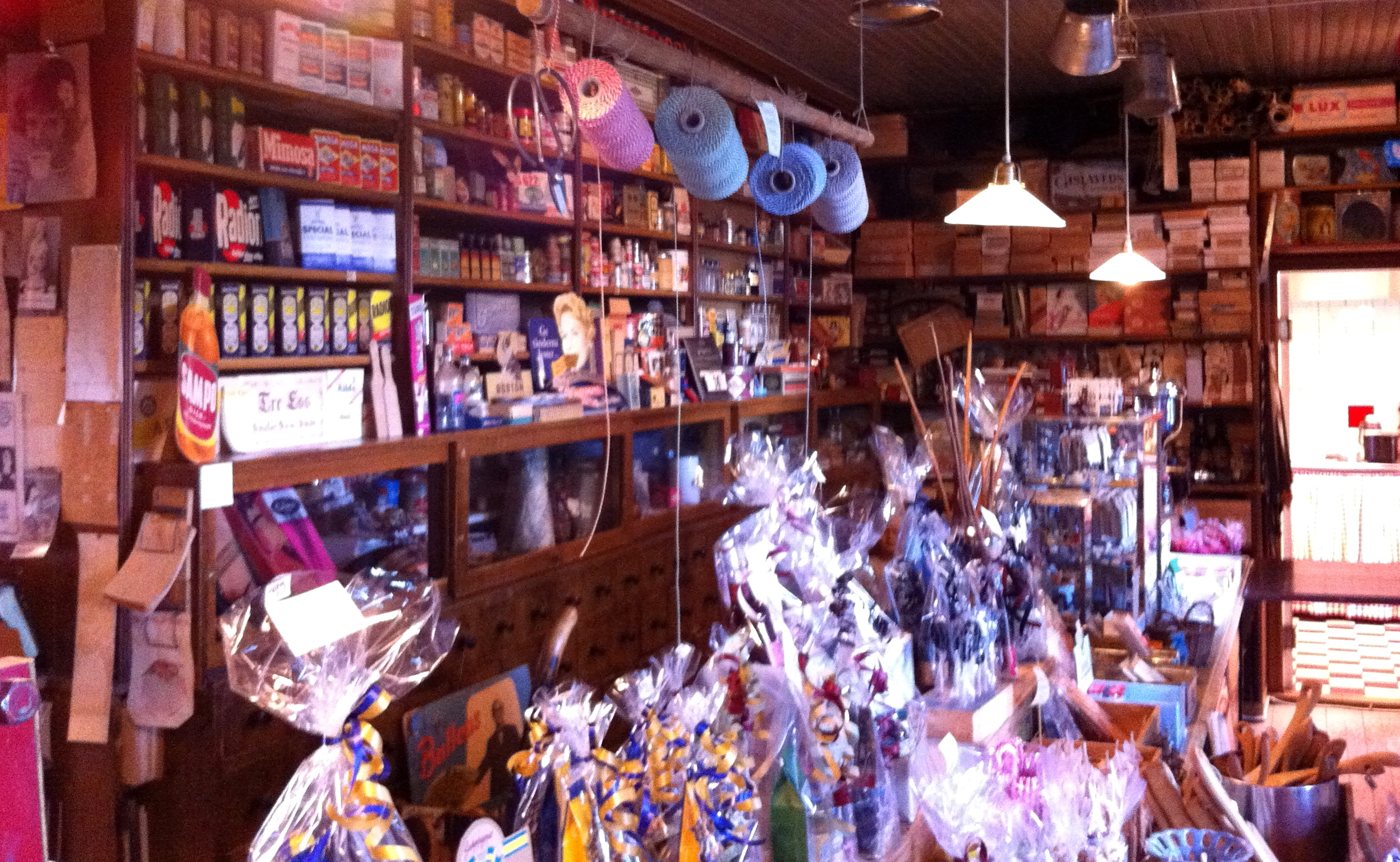 Levanders lanthandel, Alseda, Vetlanda kommun